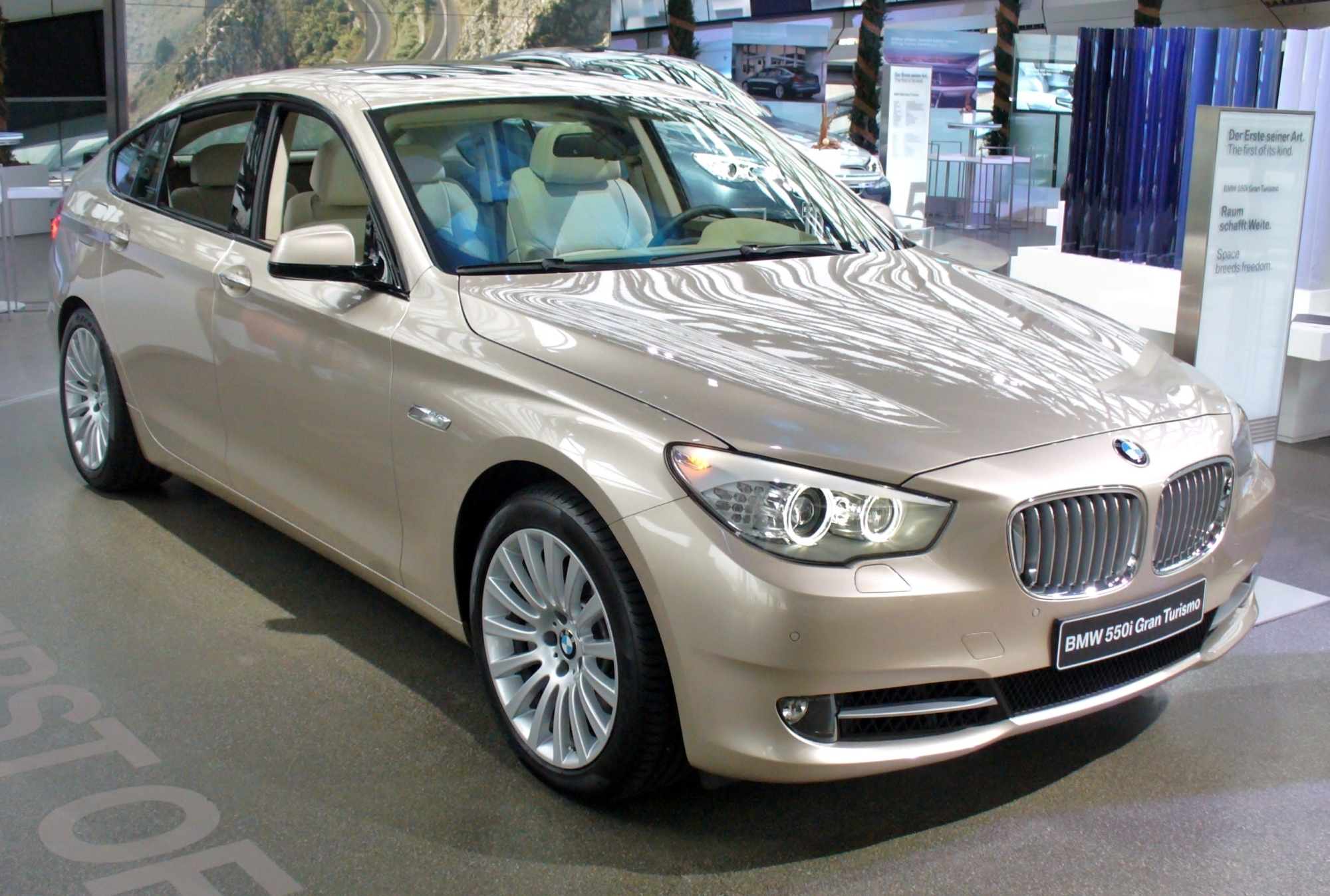 BMW 550i GT